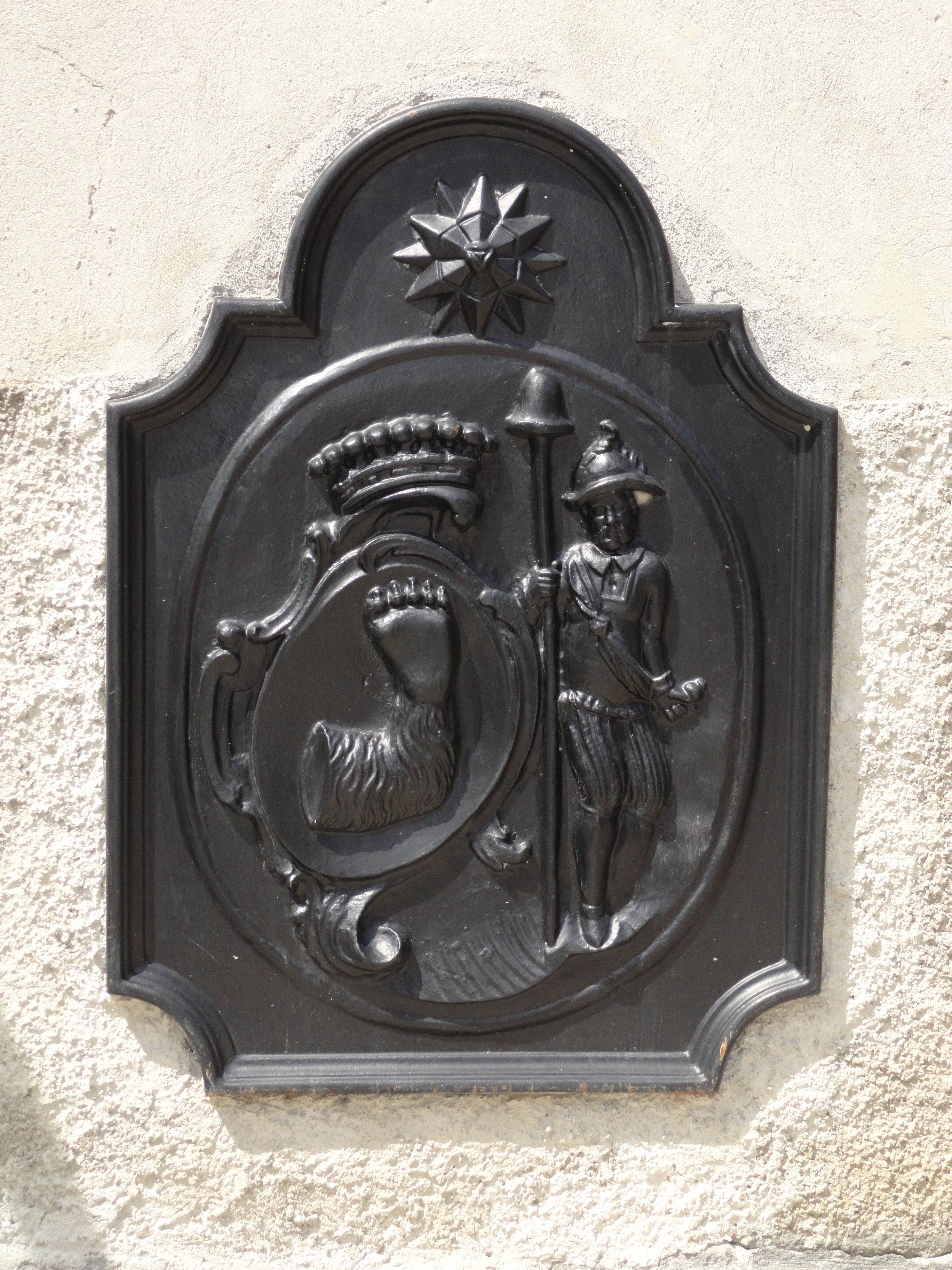 Tuor Planta in Susch, Wappen: links die Bärentatze der Plantas